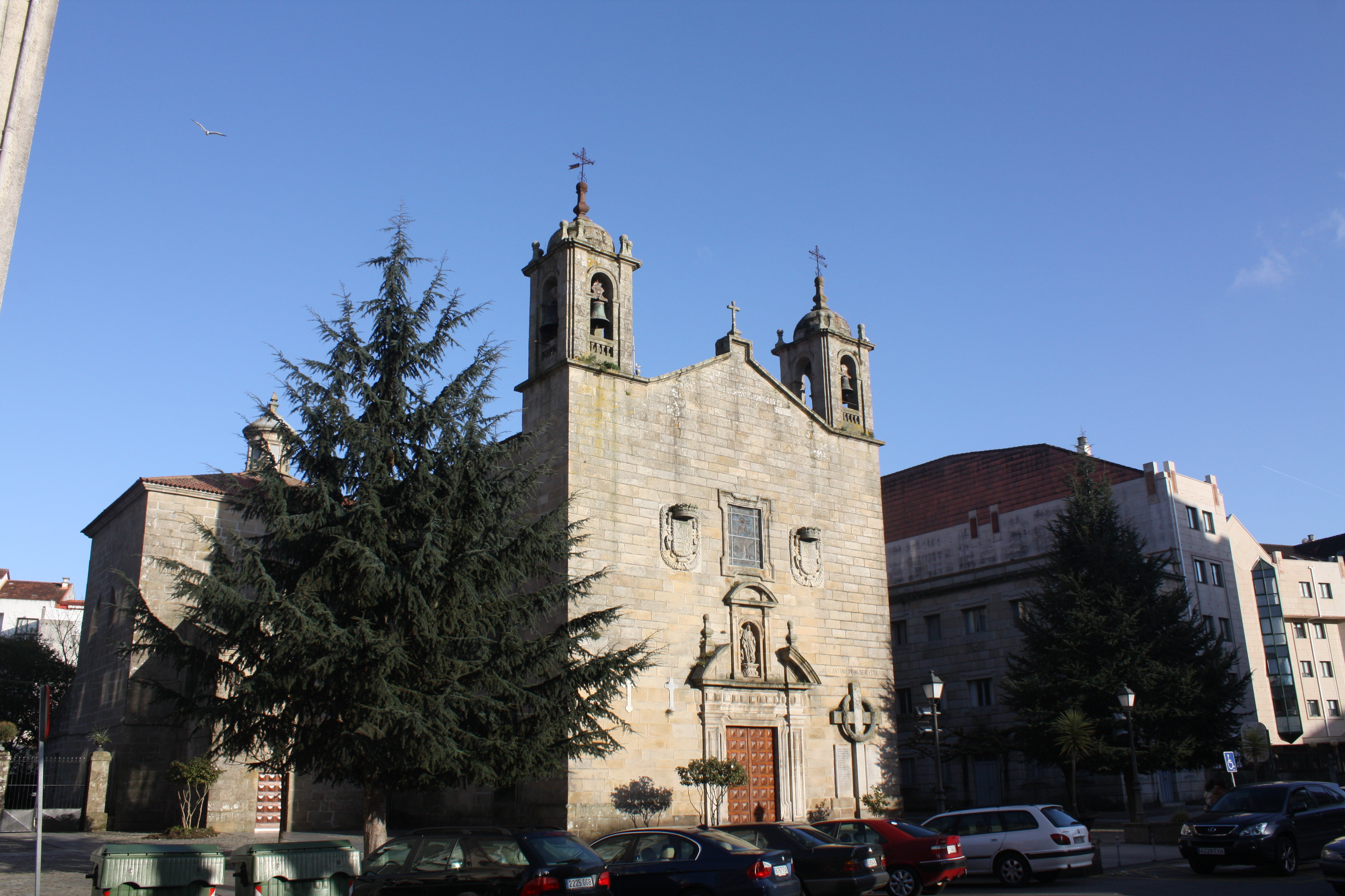 Vista xeral da igrexa de Santa Baia de Arealonga, Vilagarcía de Arousa (Pontevedra)